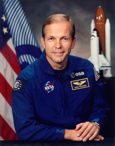 German astronaut Hans Schlegel